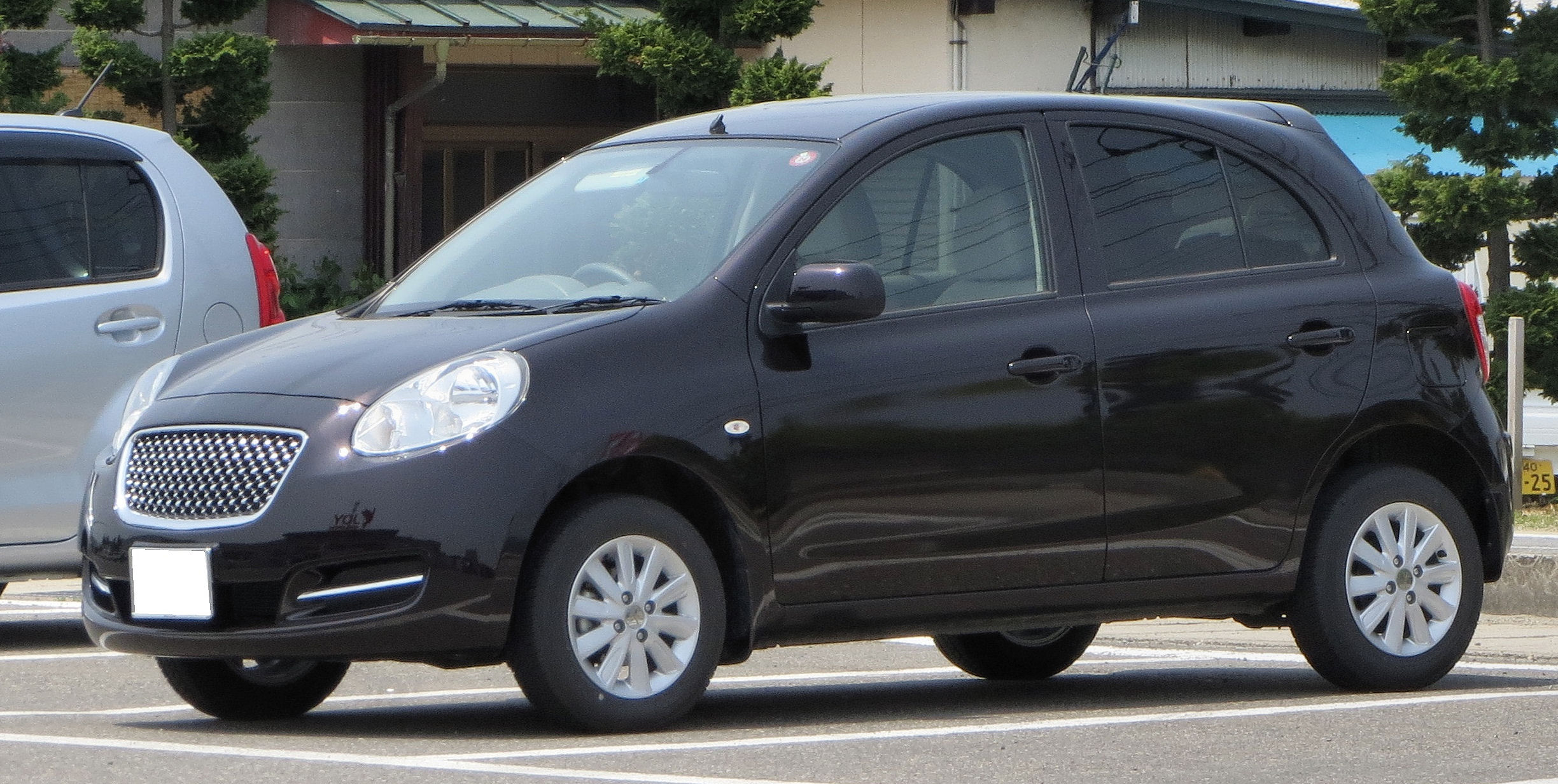 日産マーチ ボレロ(前期型)